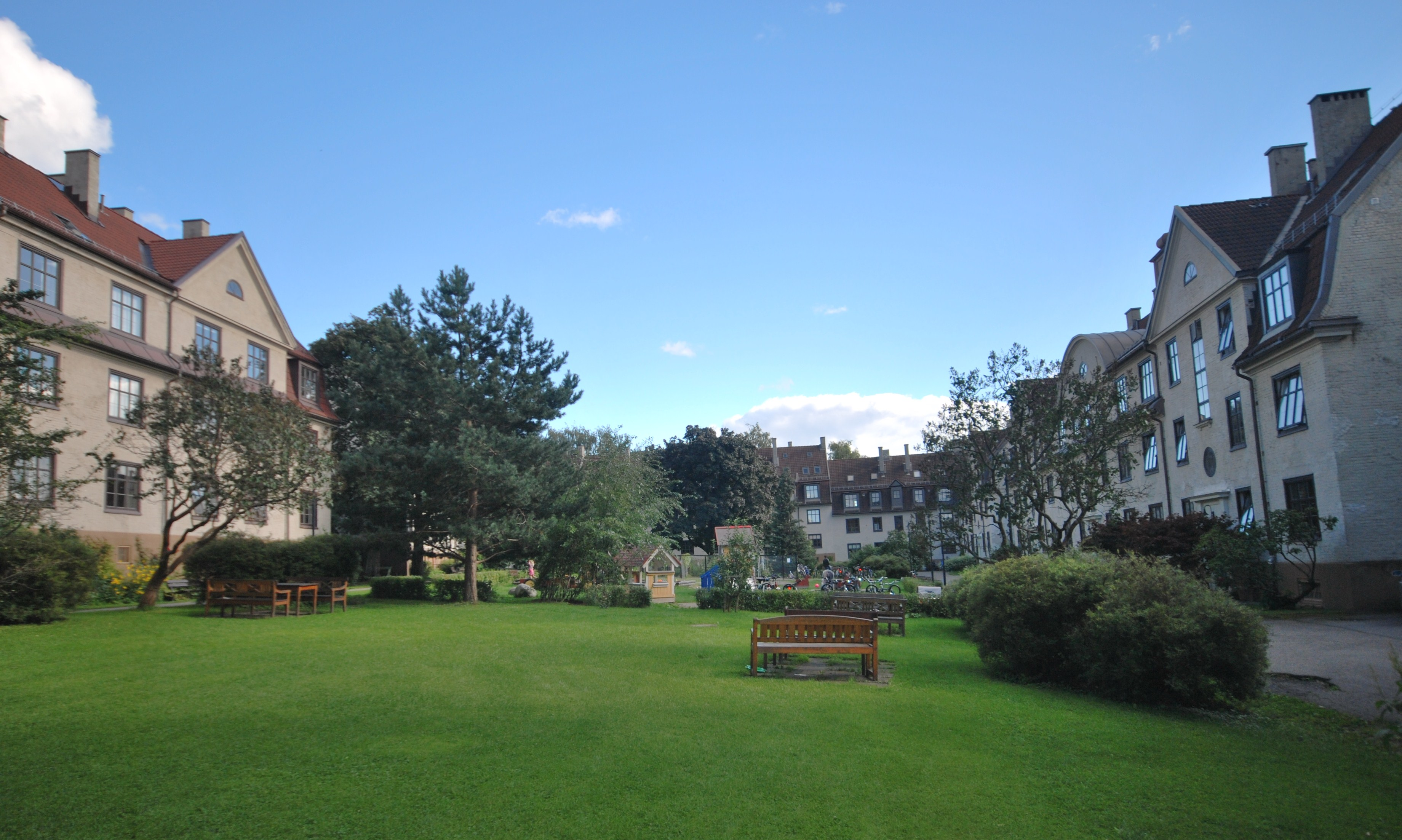 Gårdsrom i Lindern haveby, mellom Armauer Hansens gate og Ole Jacob Brochs gate, Oslo